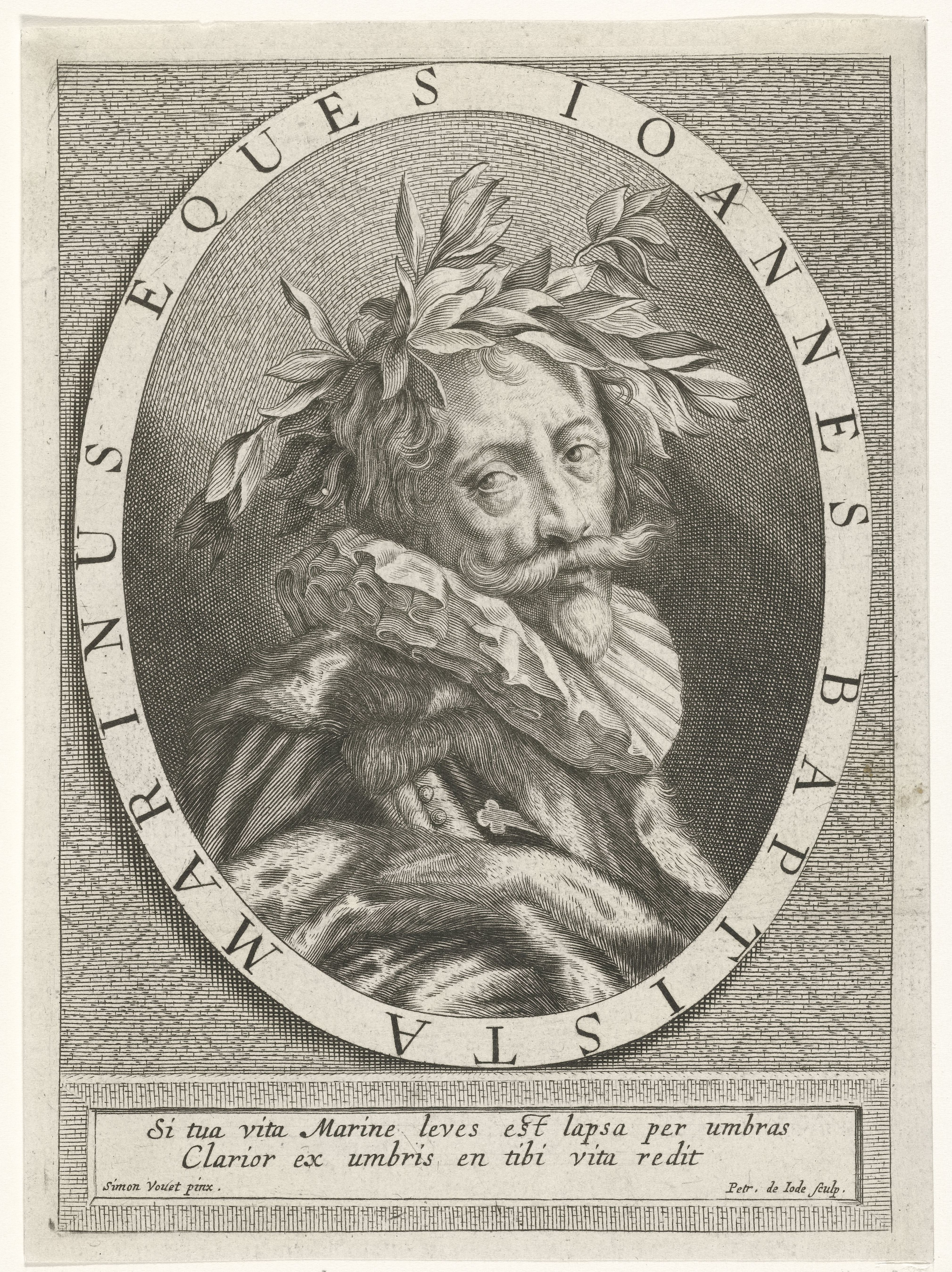 IdentificatieTitel(s): Portret van Giovanni Baptista MariniObjecttype: prent Objectnummer: RP-P-1903-A-23626Catalogusreferentie: Hollstein Dutch 258Opschriften / Merken: verzamelaarsmerk, verso onder, gestempeld: Lugt 2228Omschrijving: Busteportret van Giovanni Baptista Marini. Hij draagt een mantel, afgezet met bont, en is gekroond met een lauwerkrans. In het randschrift van de omlijsting de naam van de geportretteerde. In het kader twee regels in het Latijn.VervaardigingVervaardiger: prentmaker: Pieter de Jode (I) (vermeld op object)naar schilderij van: Simon Vouet (vermeld op object)Plaats vervaardiging: AntwerpenDatering: 1590 - 1632Fysieke kenmerken: gravureMateriaal: papier Techniek: graveren (drukprocedé)Afmetingen: plaatrand: h 189 mm × b 137 mmOnderwerpWie: Giovanni Baptista MariniVerwerving en rechtenVerwerving: aankoop nov-1903Copyright: Publiek domein